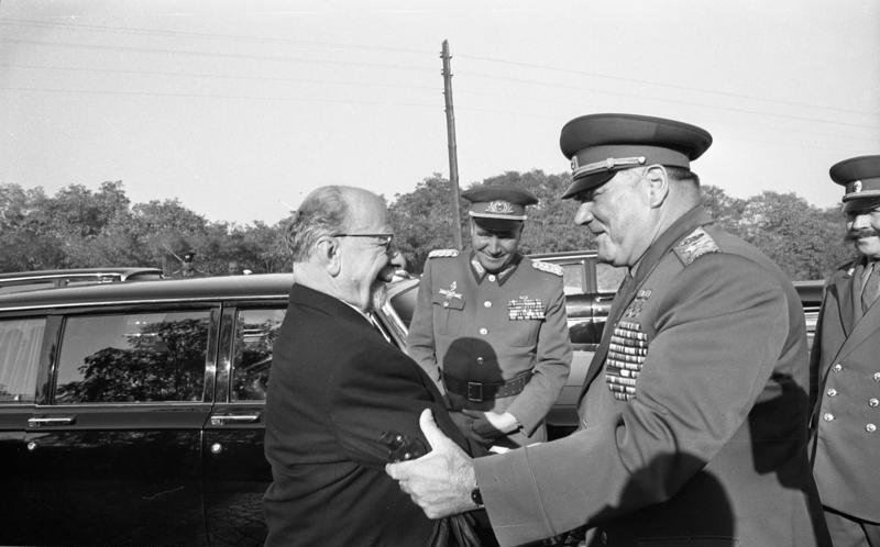 Ulbricht und Jakubowski, Manöverbesuch Zentralbild/Koard/12.10.70 Manöverraum: Manöver "Waffenbrüderschaft" - In herzlichem Gespräch (v.l.n.r.) der Erste Sekretär des ZK der SED, Vorsitzender des Staatsrates und des Nationalen Verteidigungsrates der DDR, Walter Ulbricht, Armeegeneral Hein Hoffmann und Marschall der Sowjetunion I. I. Jakubowski. Abgebildete Personen: Ulbricht, Walter: Staatsratsvorsitzender, Erster Sekretär des Zentralkomitees (ZK) der SED, Vorsitzender des Nationalen Verteidigungsrates, DDR (GND 118625179) Hoffmann, Heinz: Minister für Nationale Verteidigung, Mitglied des ZK der SED, DDR (GND 118552503) Jakubowski, Iwan I.: Armeegeneral, Sowjetunion (GND 107885816)